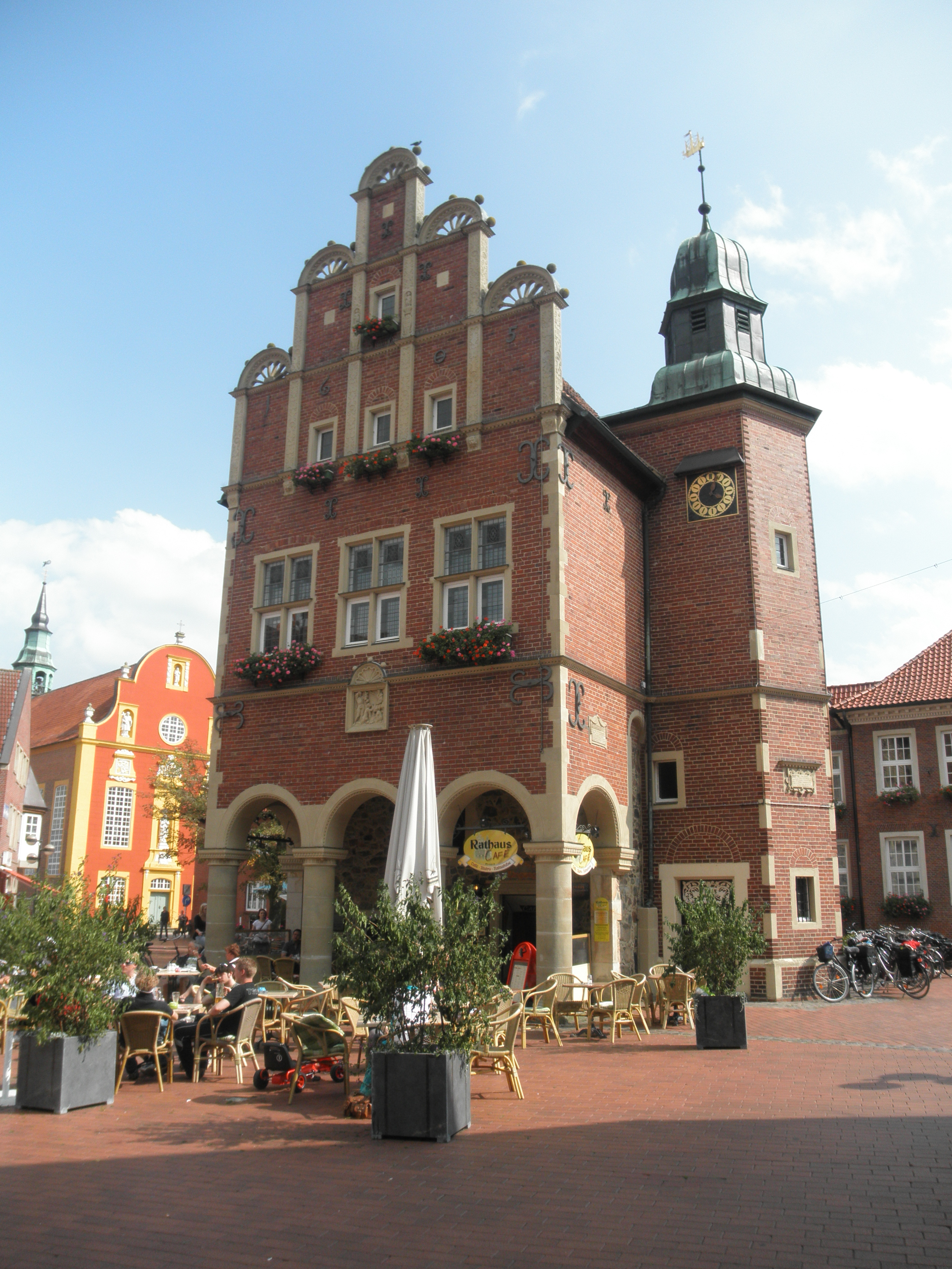 Historia urbodomo Meppen